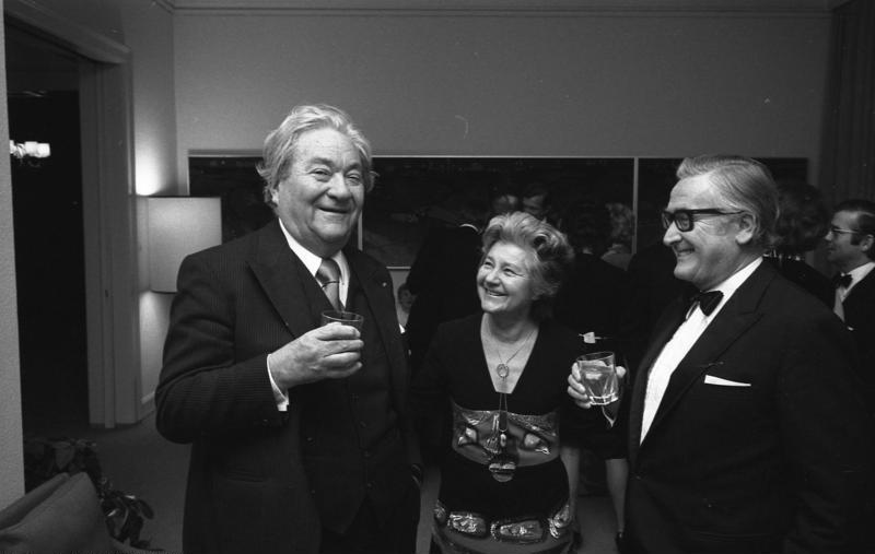 Empfang für ausländische Diplomaten in der Landesvertretung Hamburg / Bonn